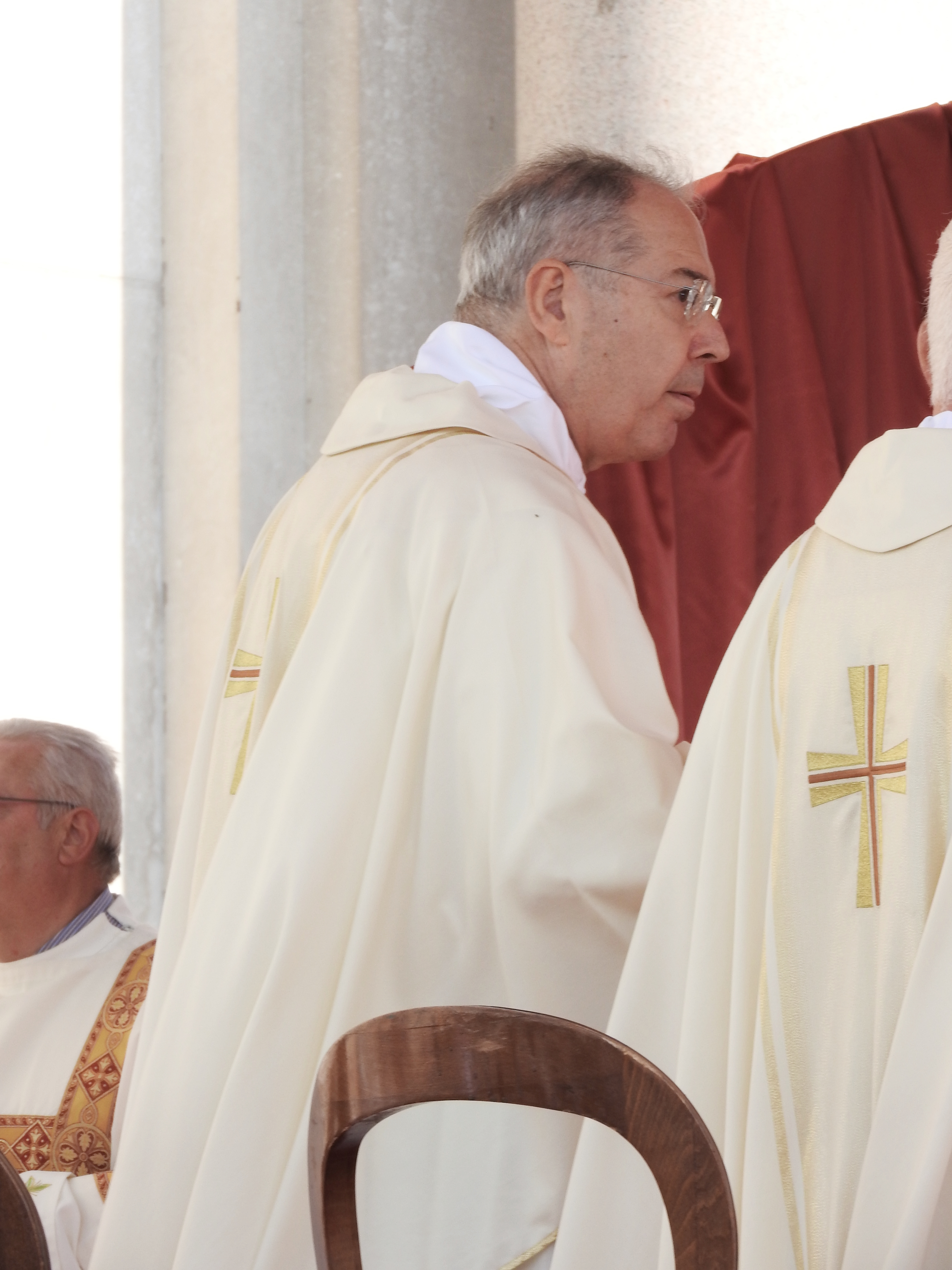 il vescovo Tommaso Caputo durante una celebrazione eucaristica